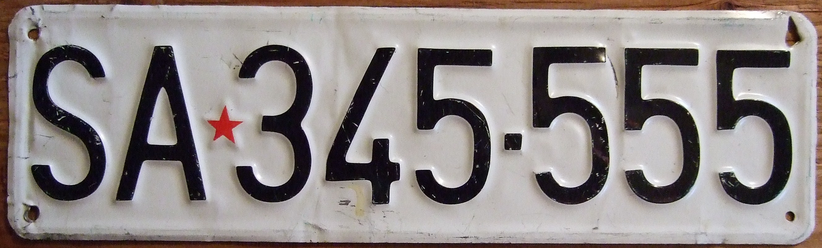 YUGOSLAVIA, BOSNIA-HERZOGOVINA, SARAJEVO pre1991 ---LICENSE PLATE